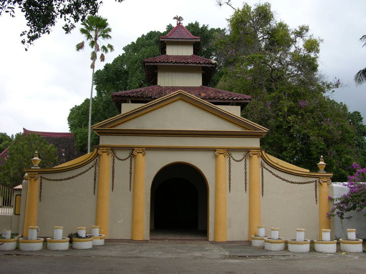 Labhang Mesem, "la porte souriante" du palais de Sumenep dans l'île de Madura en Indonésie